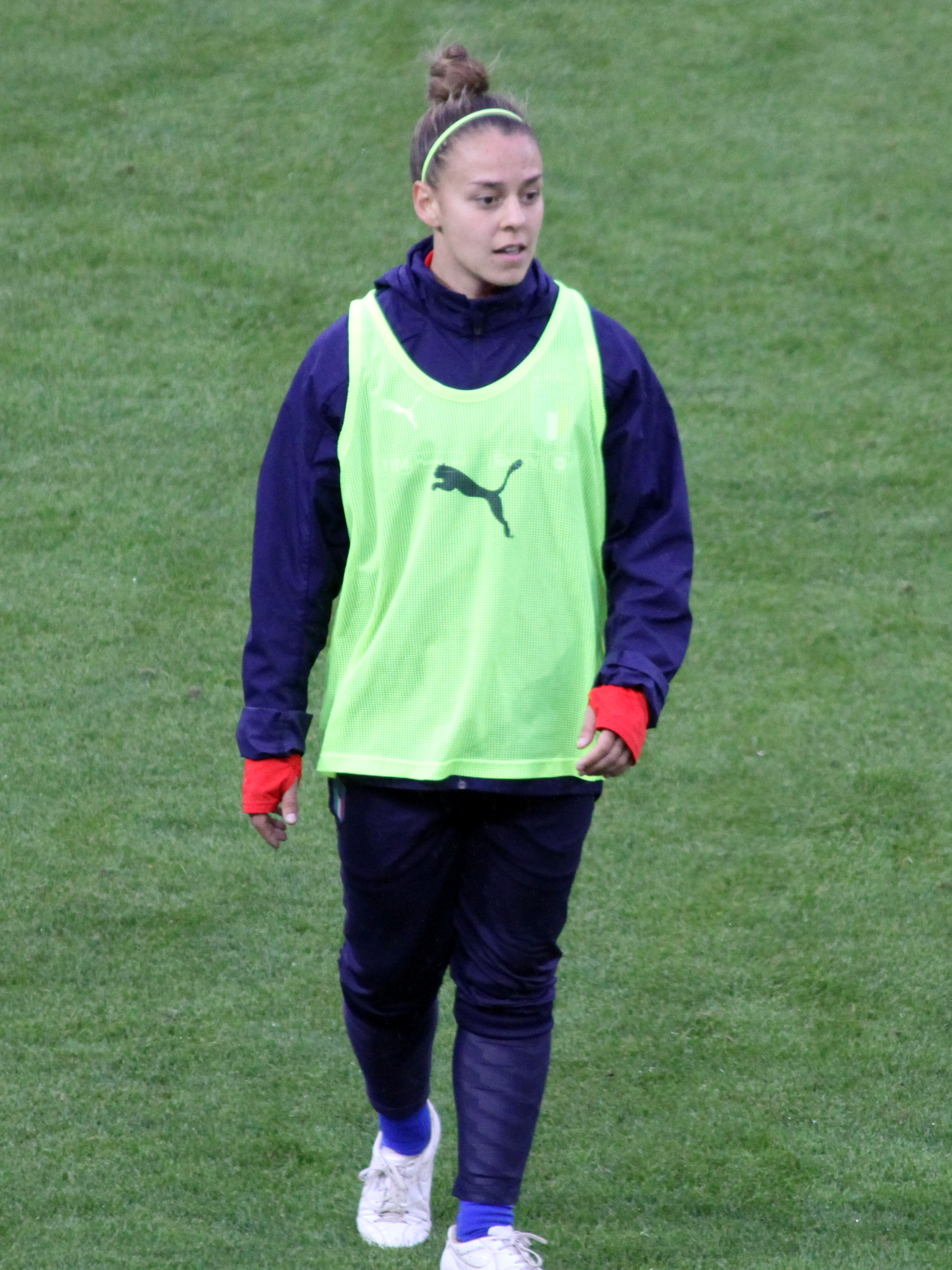 Lisa Boattin, difensore della nazionale di calcio femminile dell'Italia, durante il riscaldamento tra i due tempi dell'incontro Italia-Belgio del 10 aprile 2018 allo stadio Paolo Mazza di Ferrara.